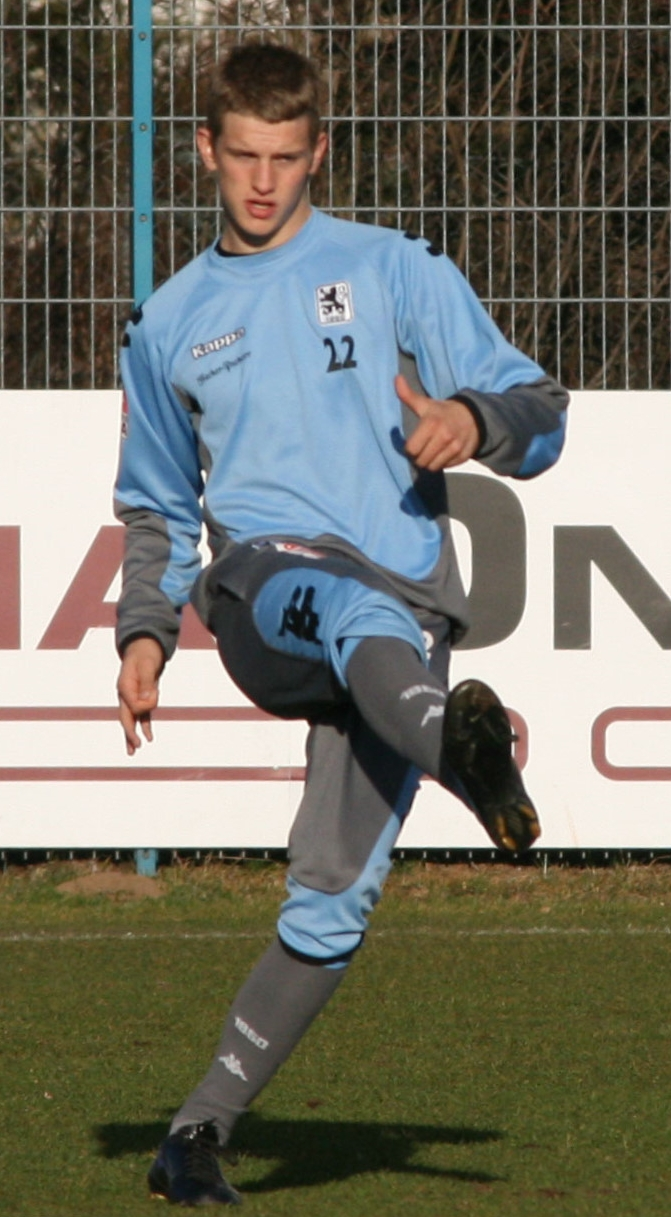 Lars Bender, player of TSV 1860 München, training, 20.01.2007, Grünwalder Str., Munich